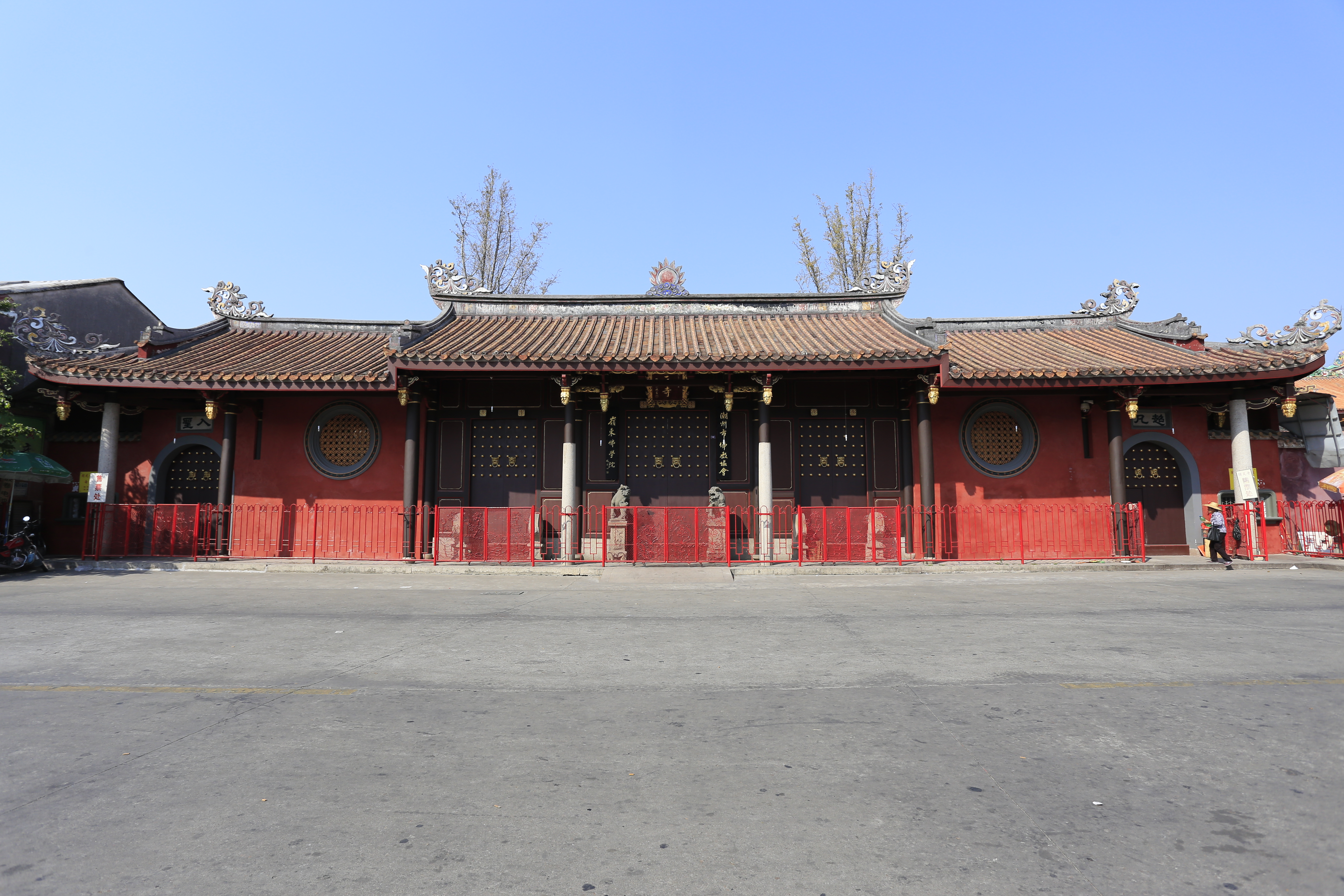 潮州开元寺 山门